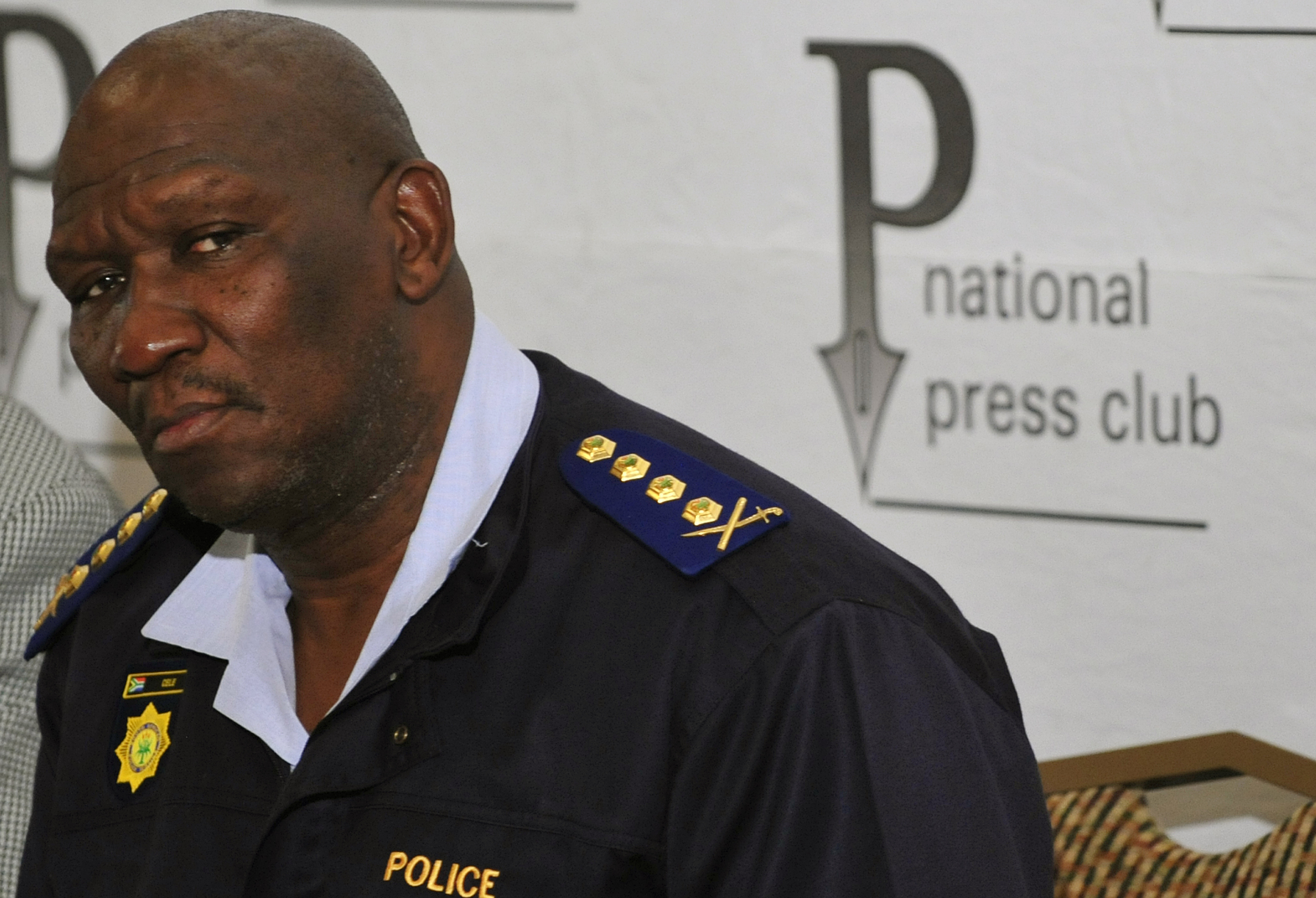 Pretória (África do Sul) - O comissário nacional da Polícia da África do Sul, general Bheki Cele, acusa jornalista britânico de complô contra o esquema de segurança da Copa do Mundo.